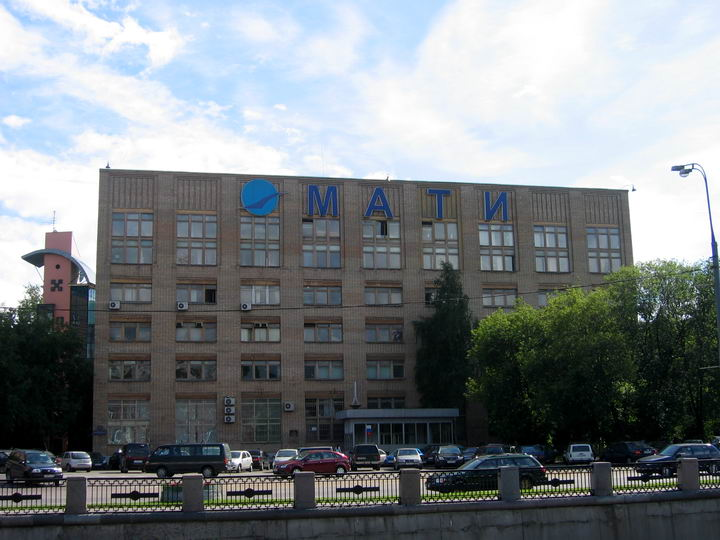 Москва, Берниковская набережная, дом 14. Здание Российского государственного технологического университета имени К. Э. Циолковского.